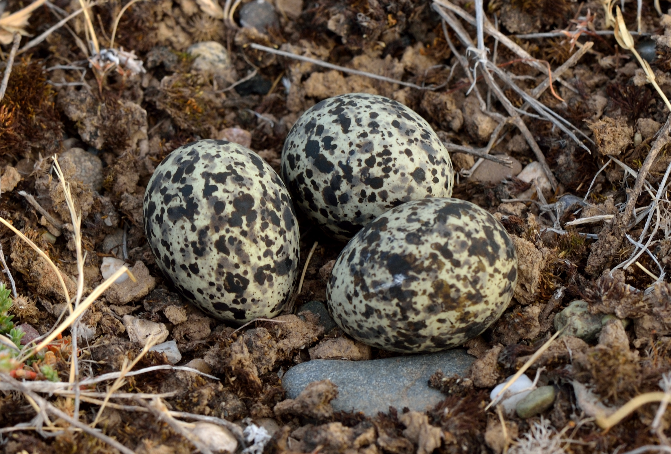 Kurdî: Hêka Glareola pratincola